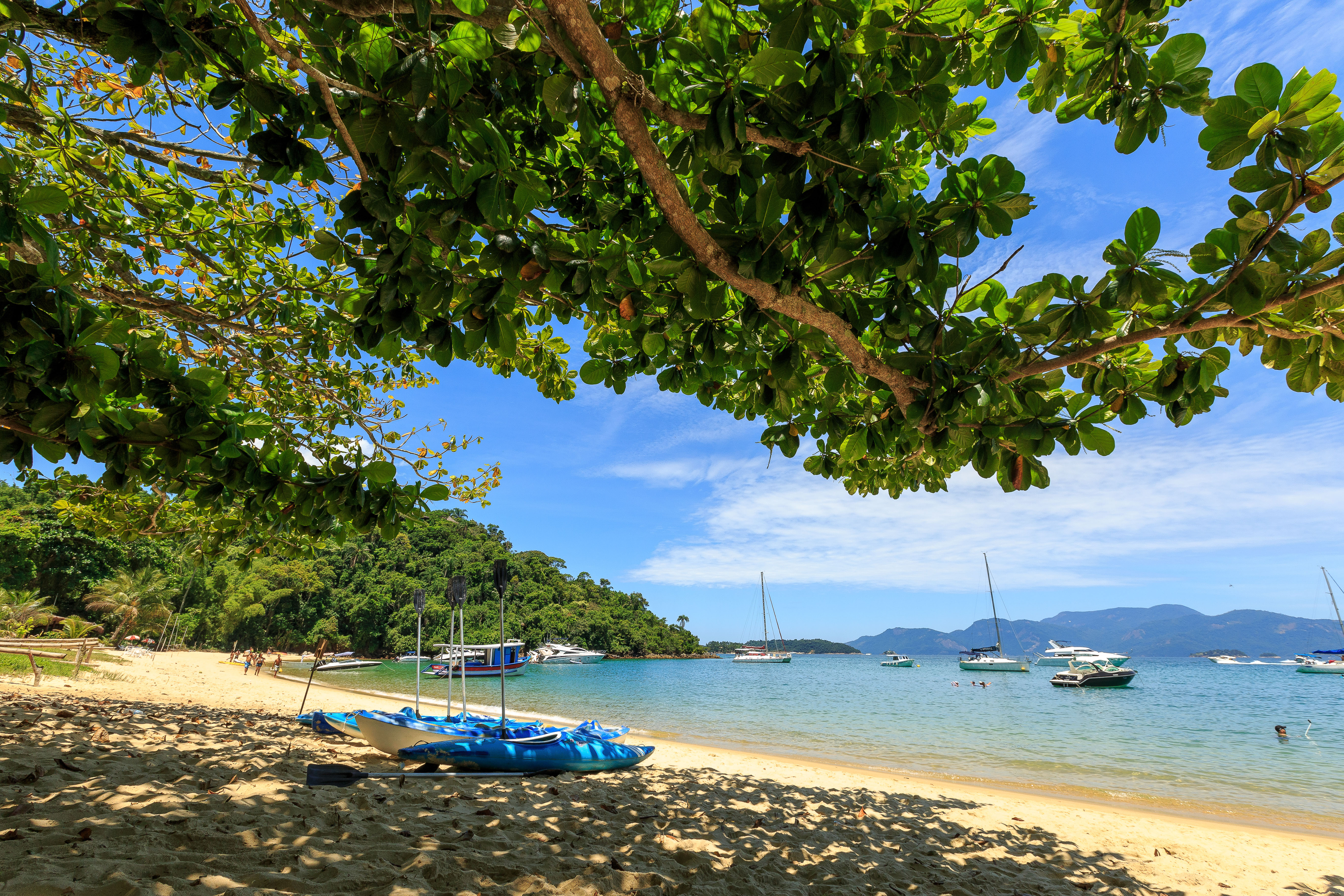 Ilha da Gipóia localizada na cidade de Angra dos Reis